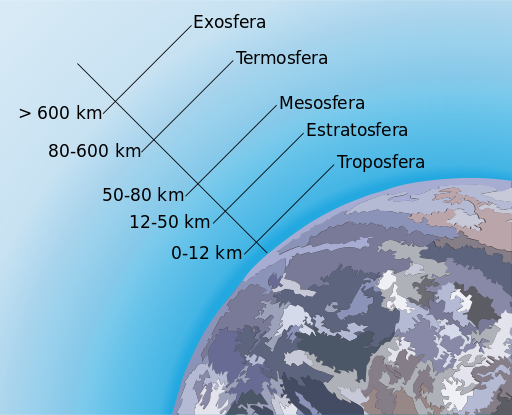 Atmosferaren geruzak.